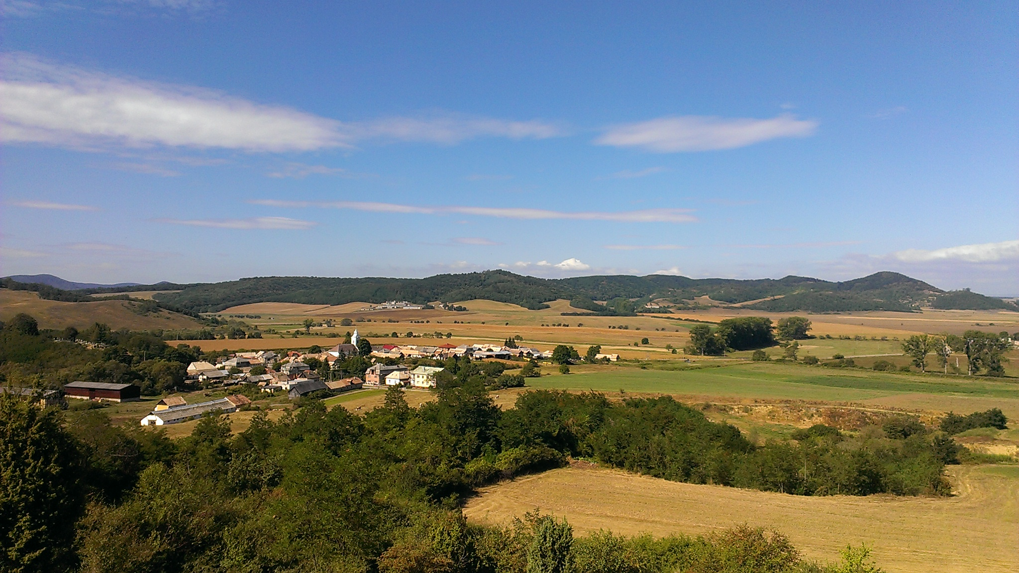 Drňa